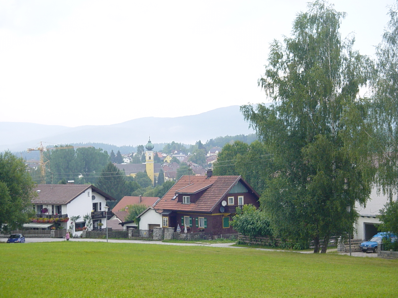 Blick auf Frauenau vom Balkon des Gästehaus Spitzhiebel